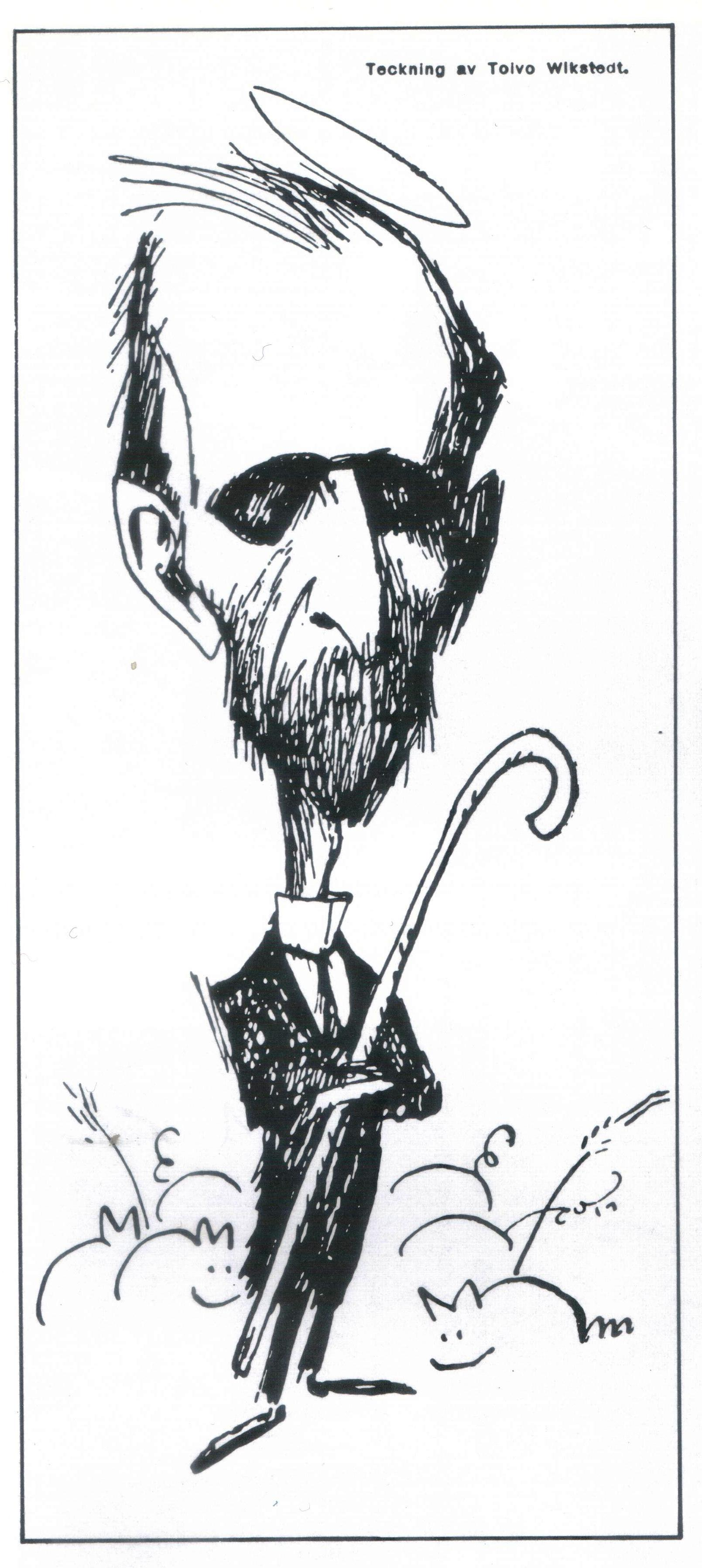 Topi Vikstedtin pilapiirros Santeri Alkiosta, ilmestynyt Finlands svenska publicistförbundetin joulujulkaisussa, Luciferissa.